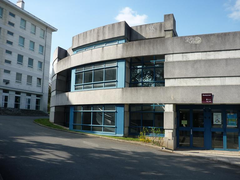 Self du lycée Chevrollier à Angers